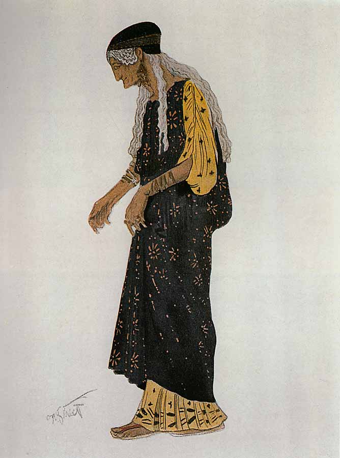 'Hippolytus', by Euripides (1902) Эскиз костюма к балету "Ипполит", 1902